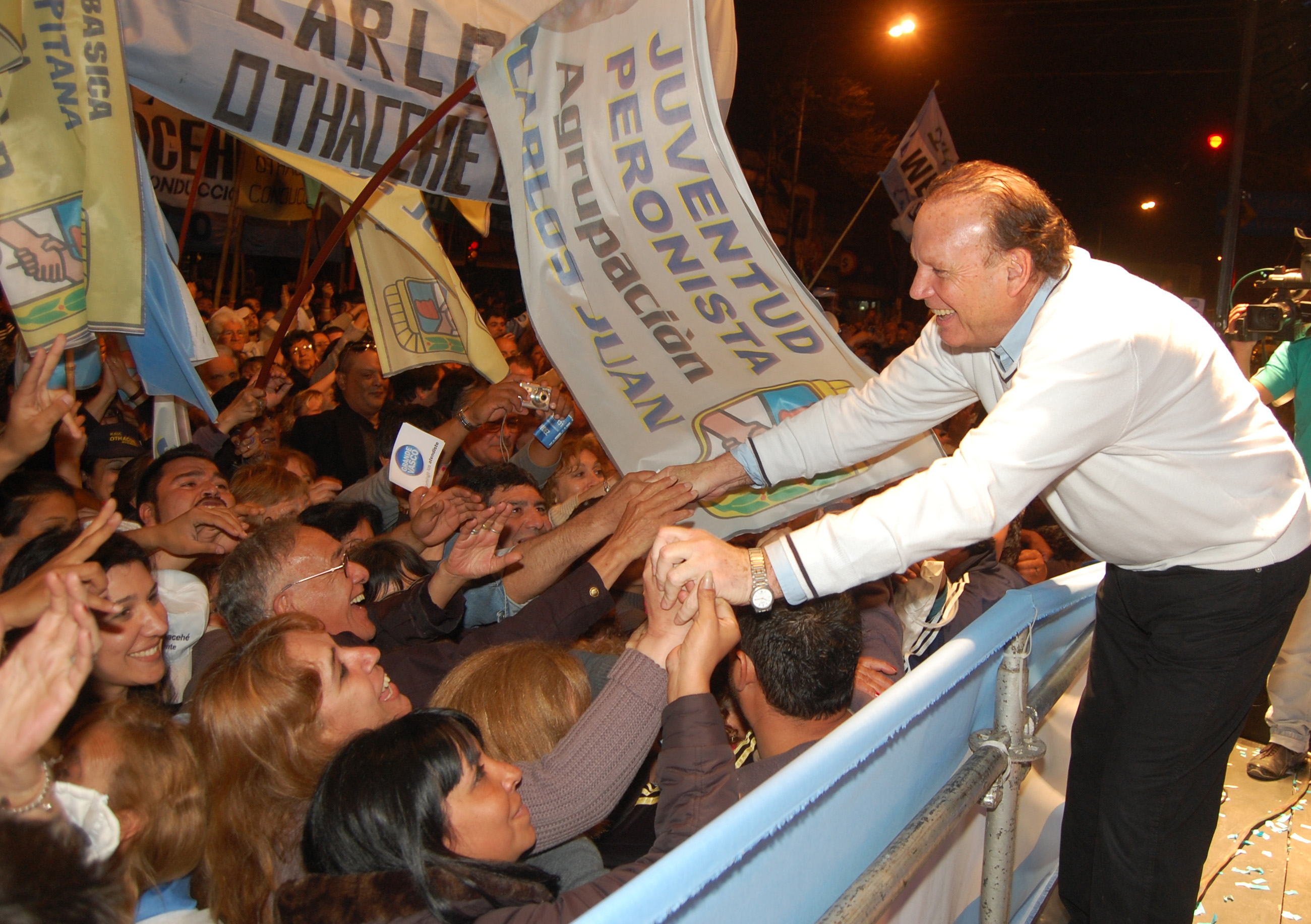 Othacehé saludando a su gente